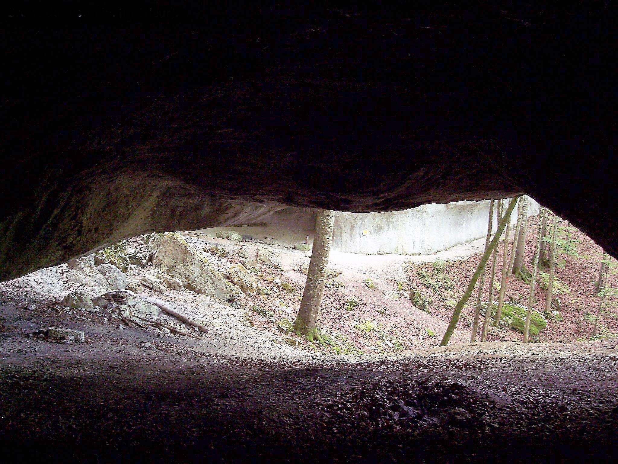 Porche de la grotte du Bisontin, vu de l'intérieur. Liebvillers. Doubs